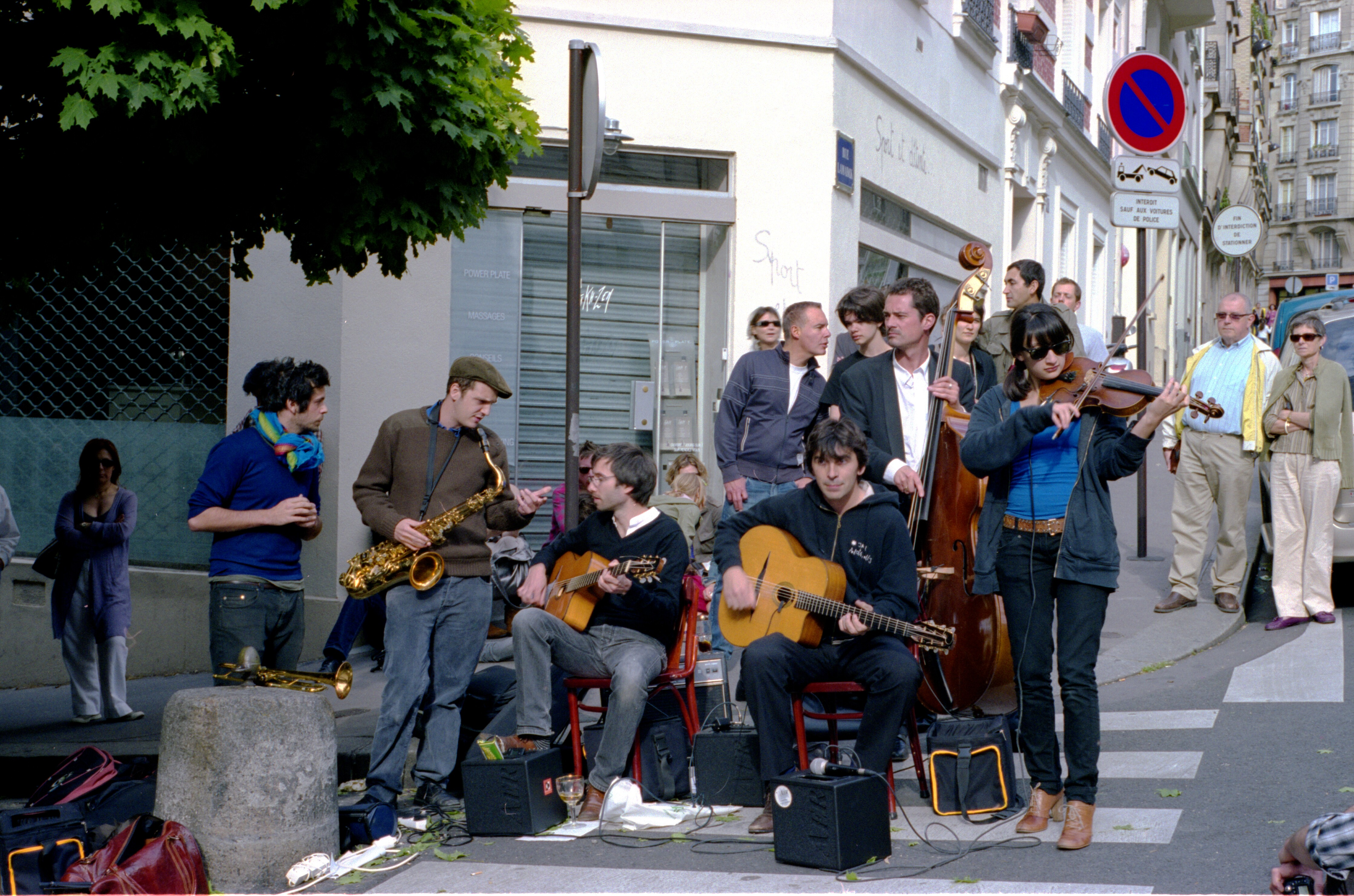 fete de la musique